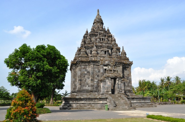 Bangunan utama di kompleks Candi Sajiwan. Selesai restorasi 2011, setelah sempat runtuh karena gempa bumi Yogyakarta 2006.